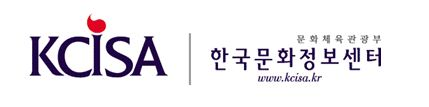 한국문화정보센터 로고